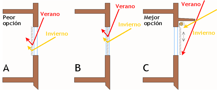 Mejores disposiciones de una persiana como protección solar a una ventana.